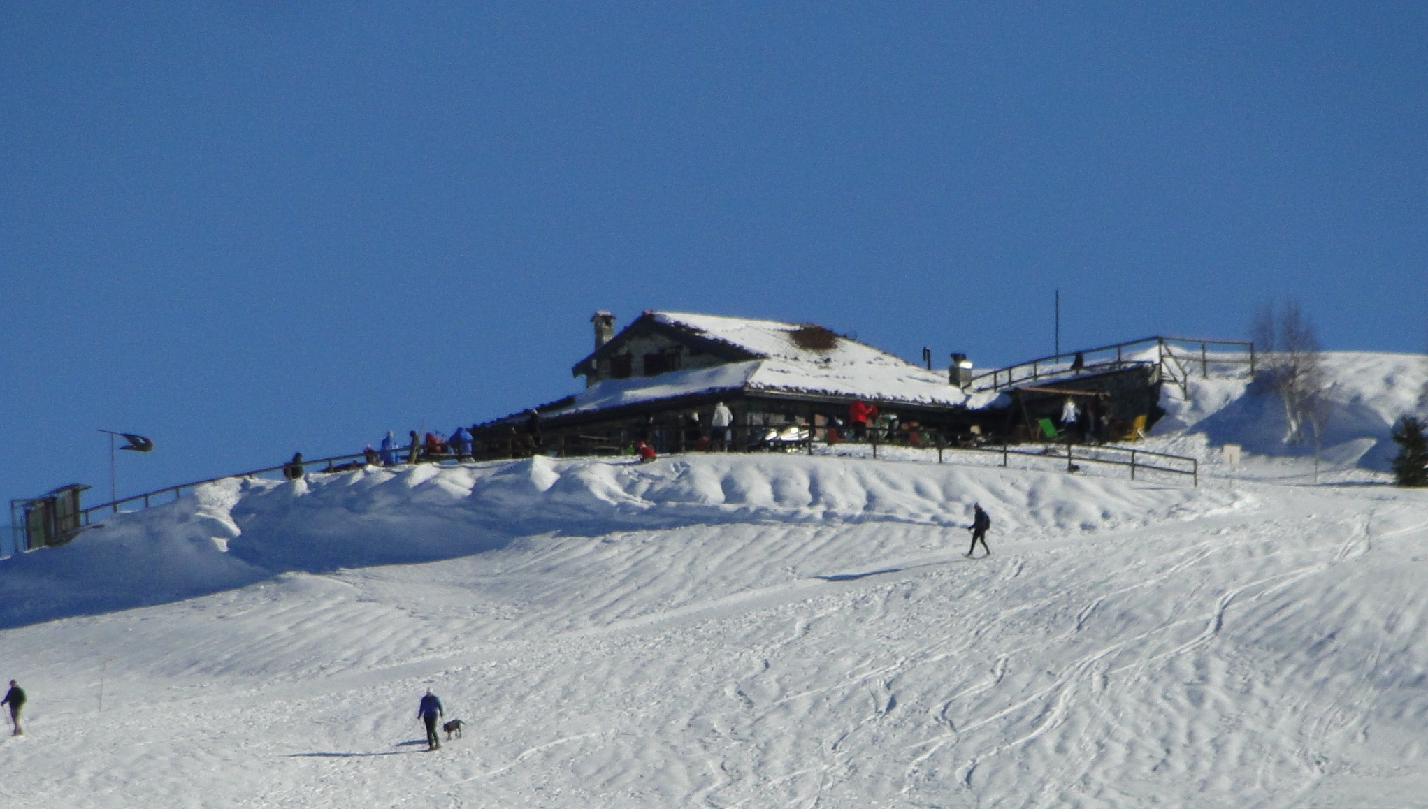 Vista dall'alto del paese di Peia (BG)